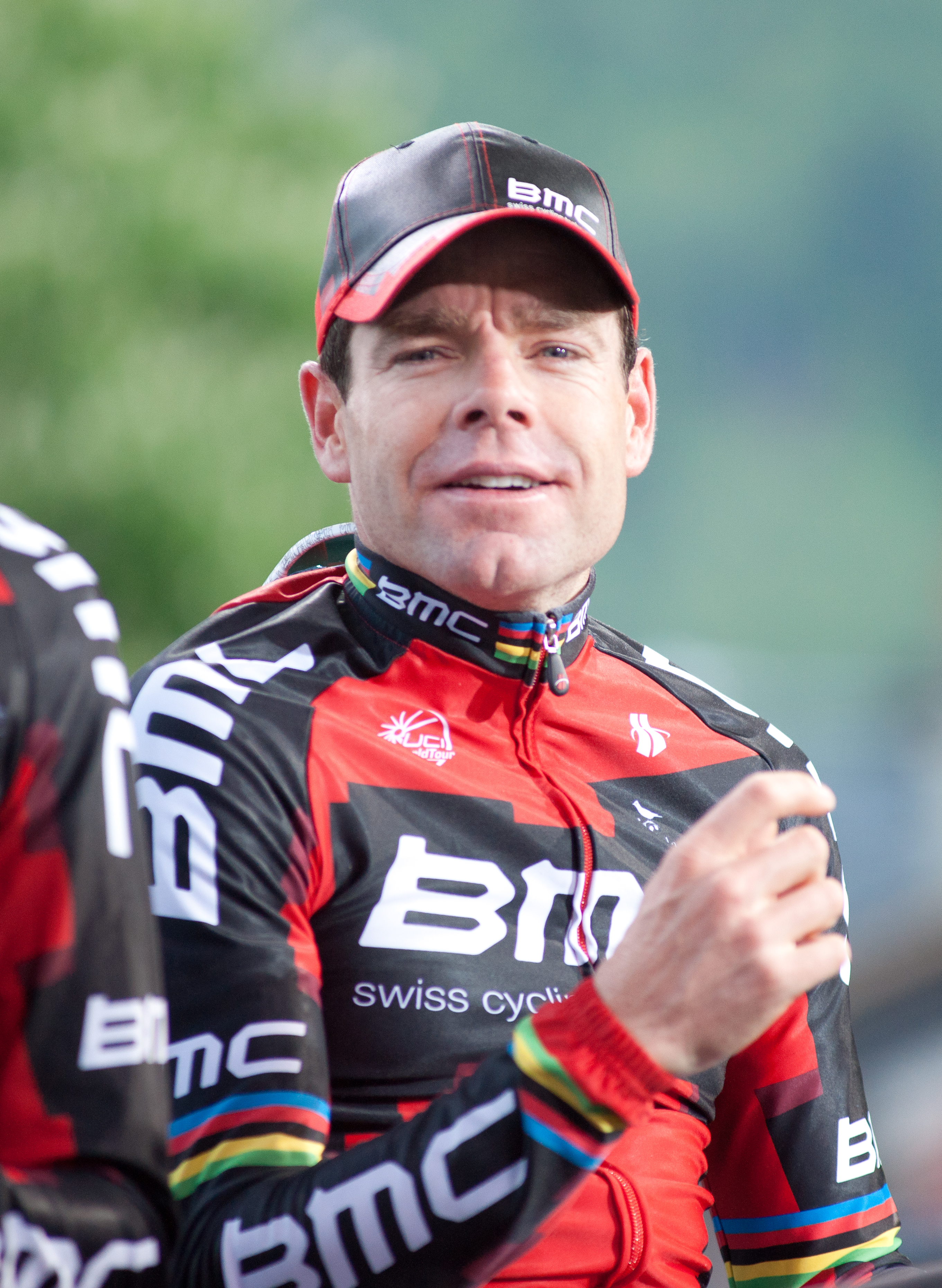 Cadel Evans lors du prologue du Tour de Romandie 2011.